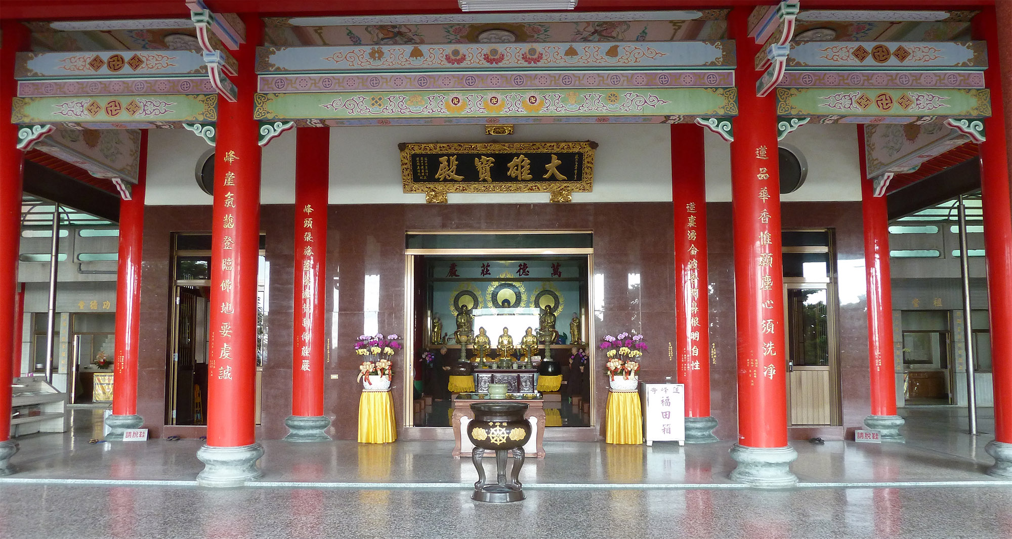 中文（台灣）: 高雄市阿蓮區大崗山蓮峰寺大雄寶殿